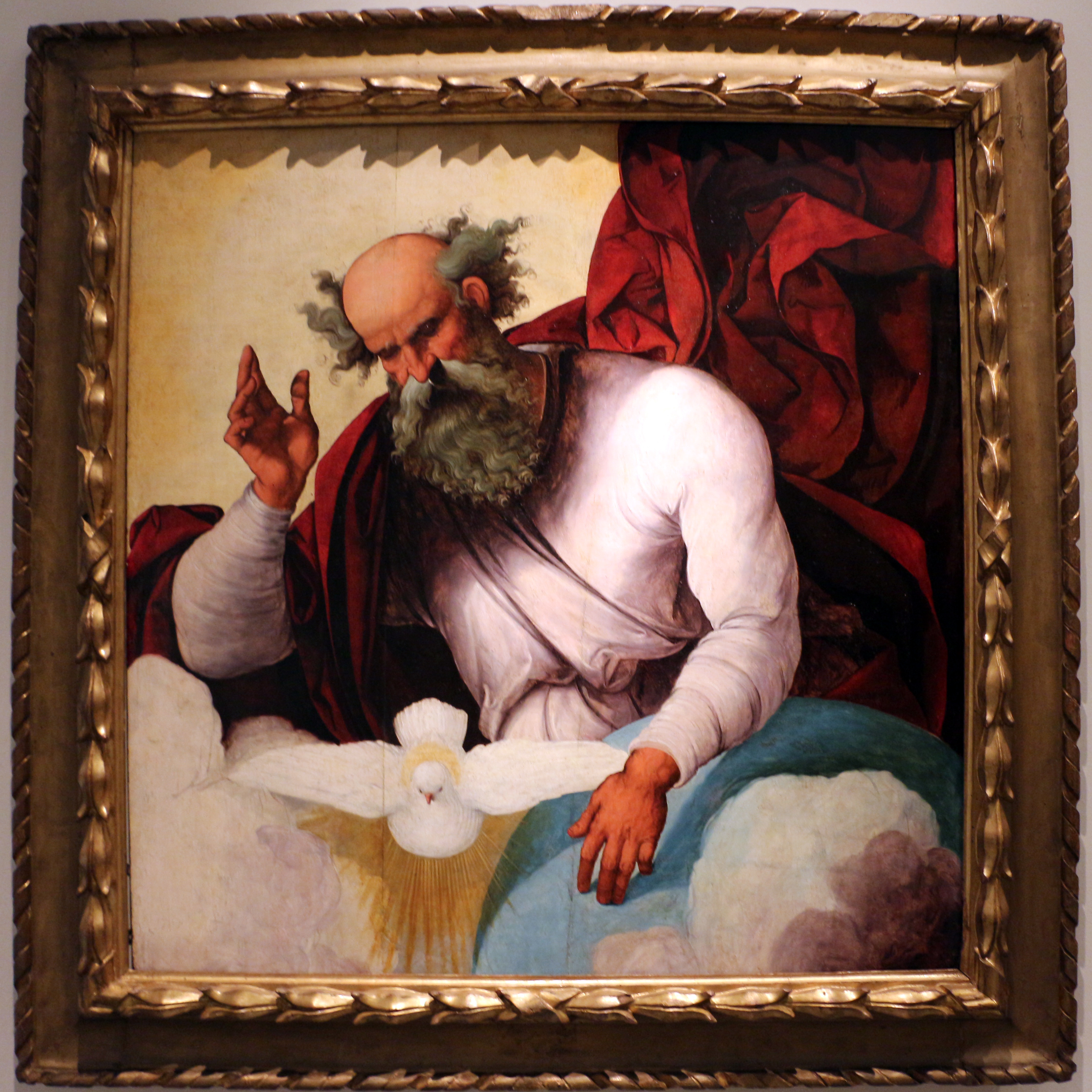 Pinacoteca Nazionale di Bologna This is a photo of a monument which is part of cultural heritage of Italy.